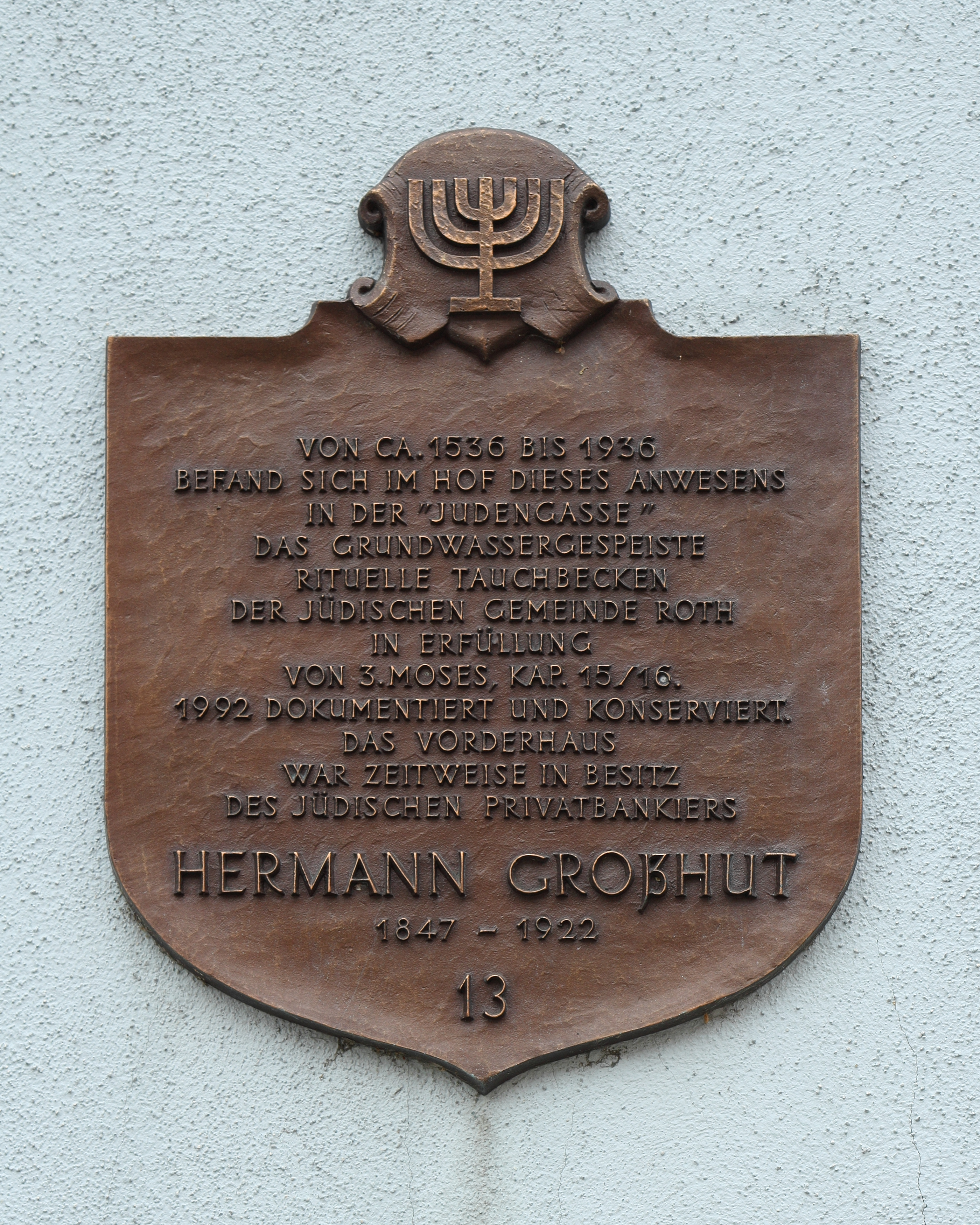 Roth - Kugelbühlstraße 4 - Detali